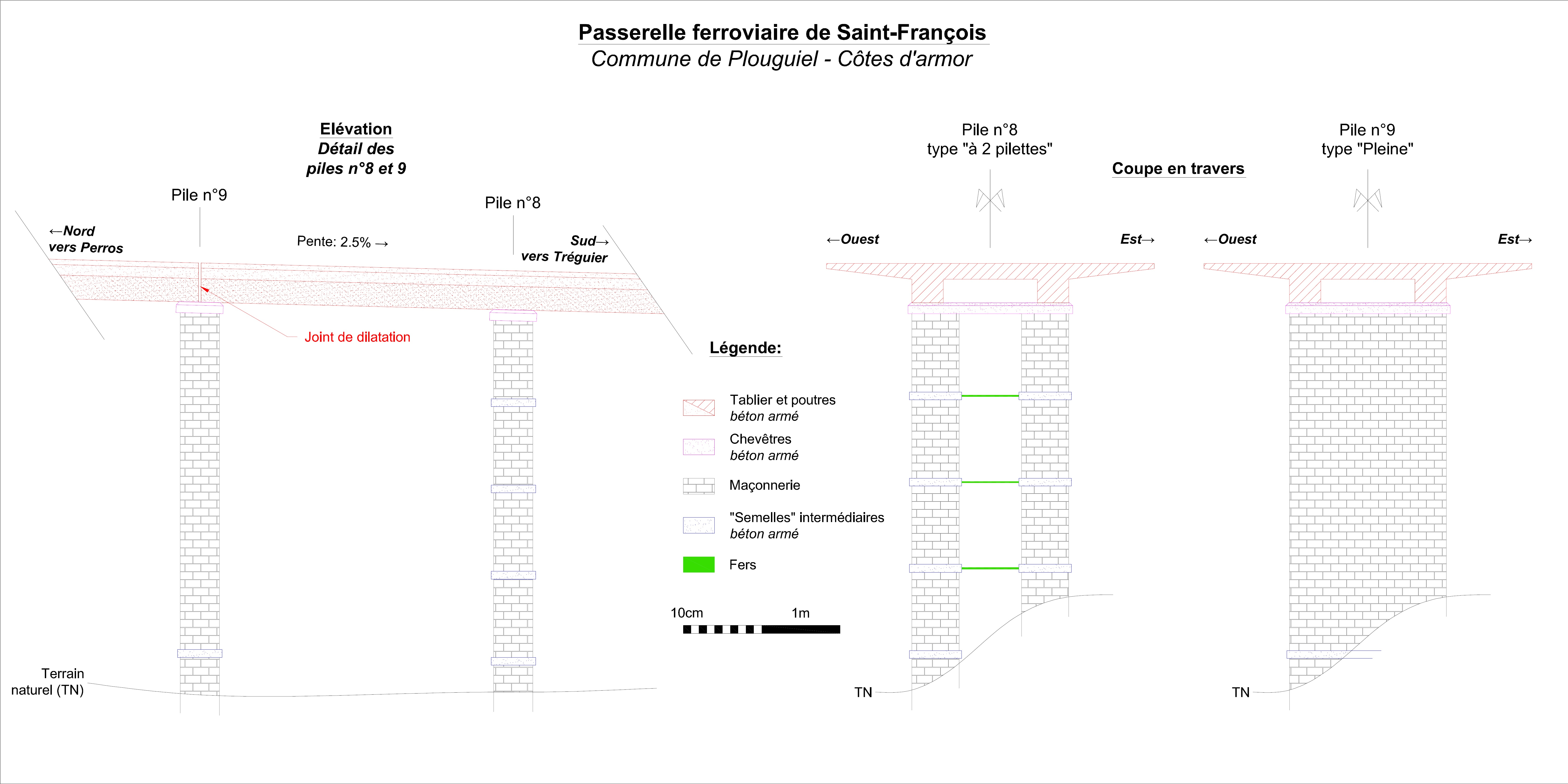 Détail de l'élévation et coupe en travers de deux piles de la passerelle ferroviaire de Saint-François à Plouguiel.